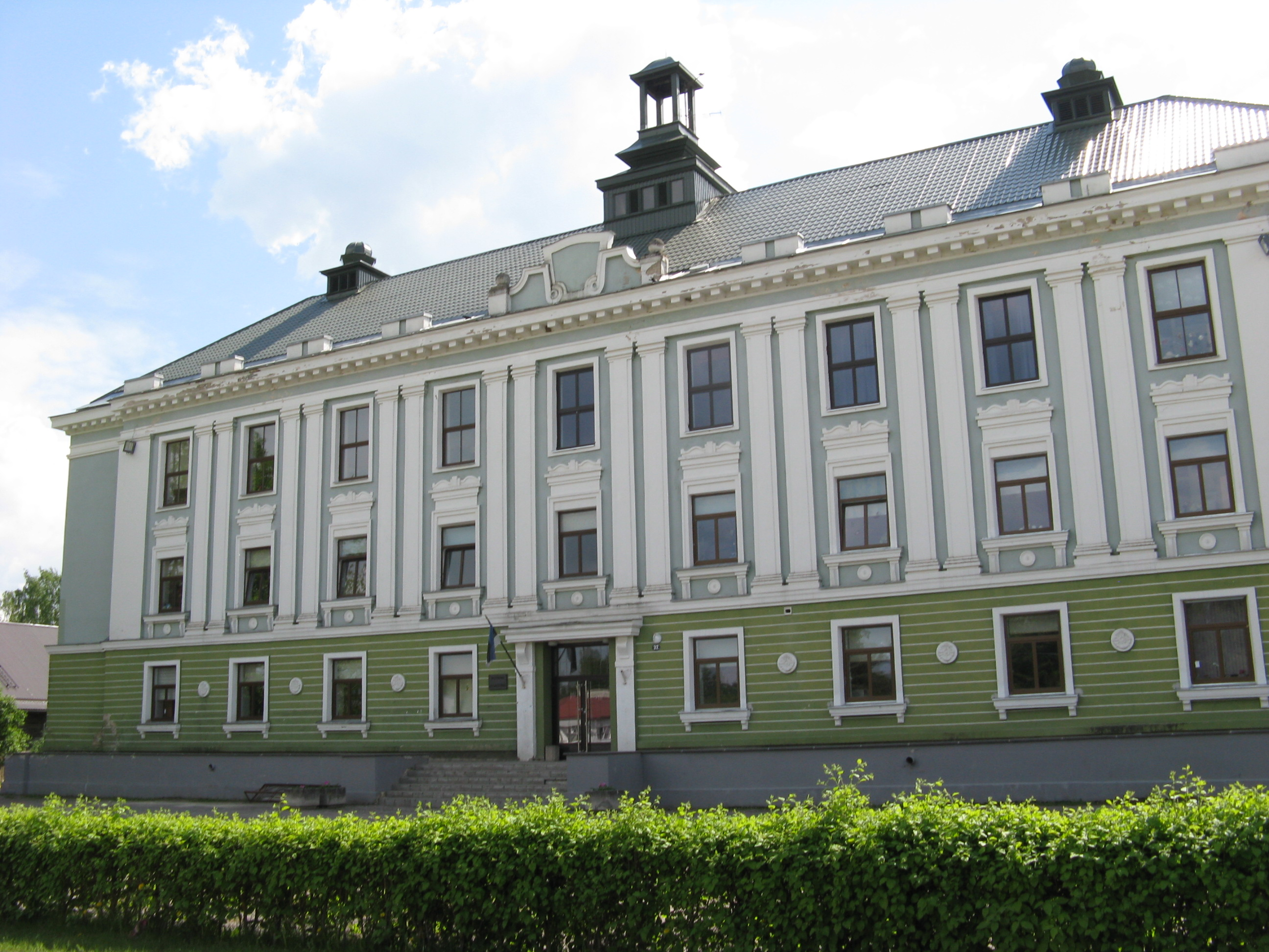 Võidu 32, Vastseliina